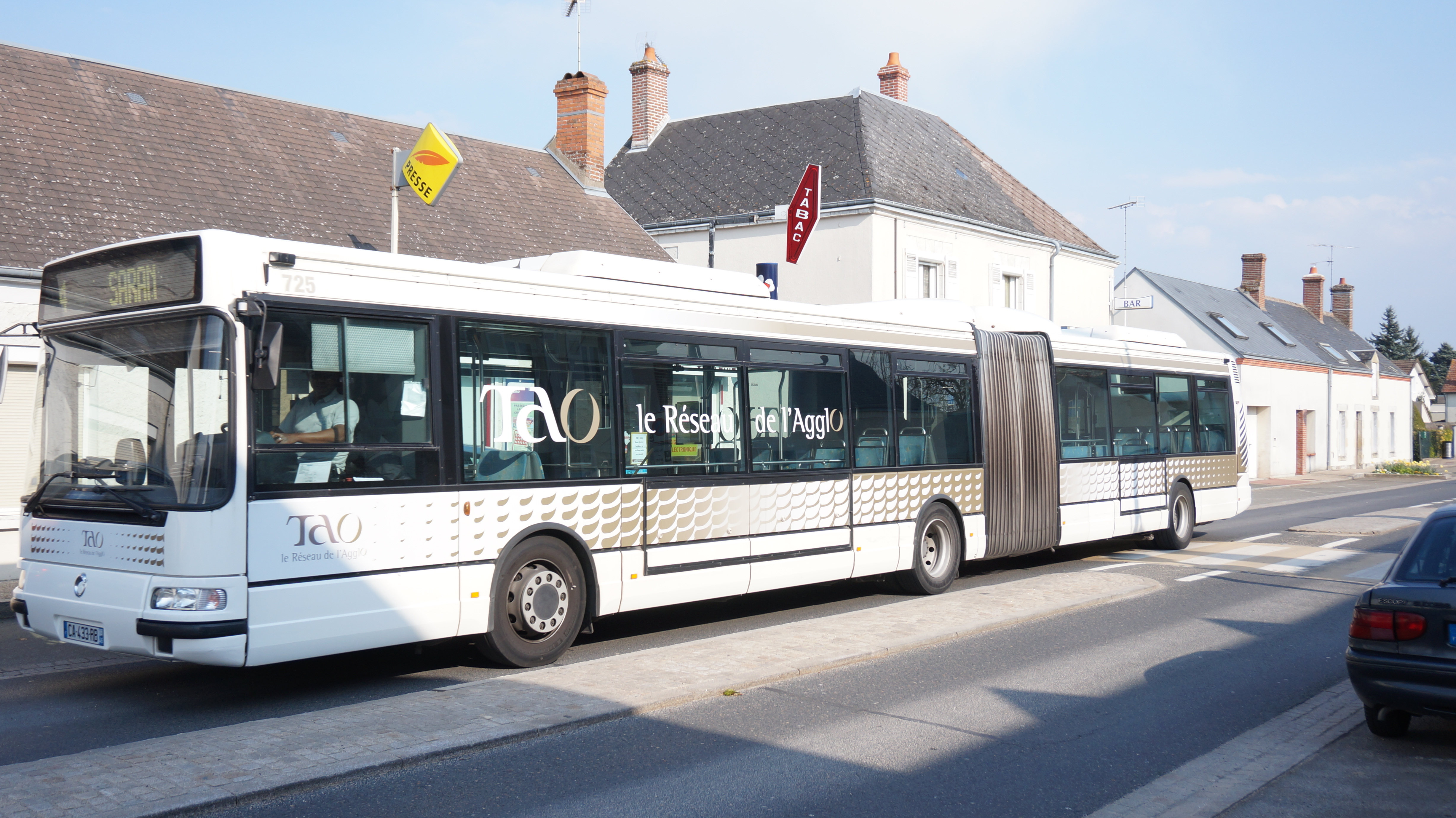 Un véhicule Agora L du réseau TAO traverse la ville de Ormes, dans le département français du Loiret.